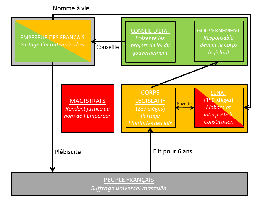 Schéma de la Constitution française de mai 1870